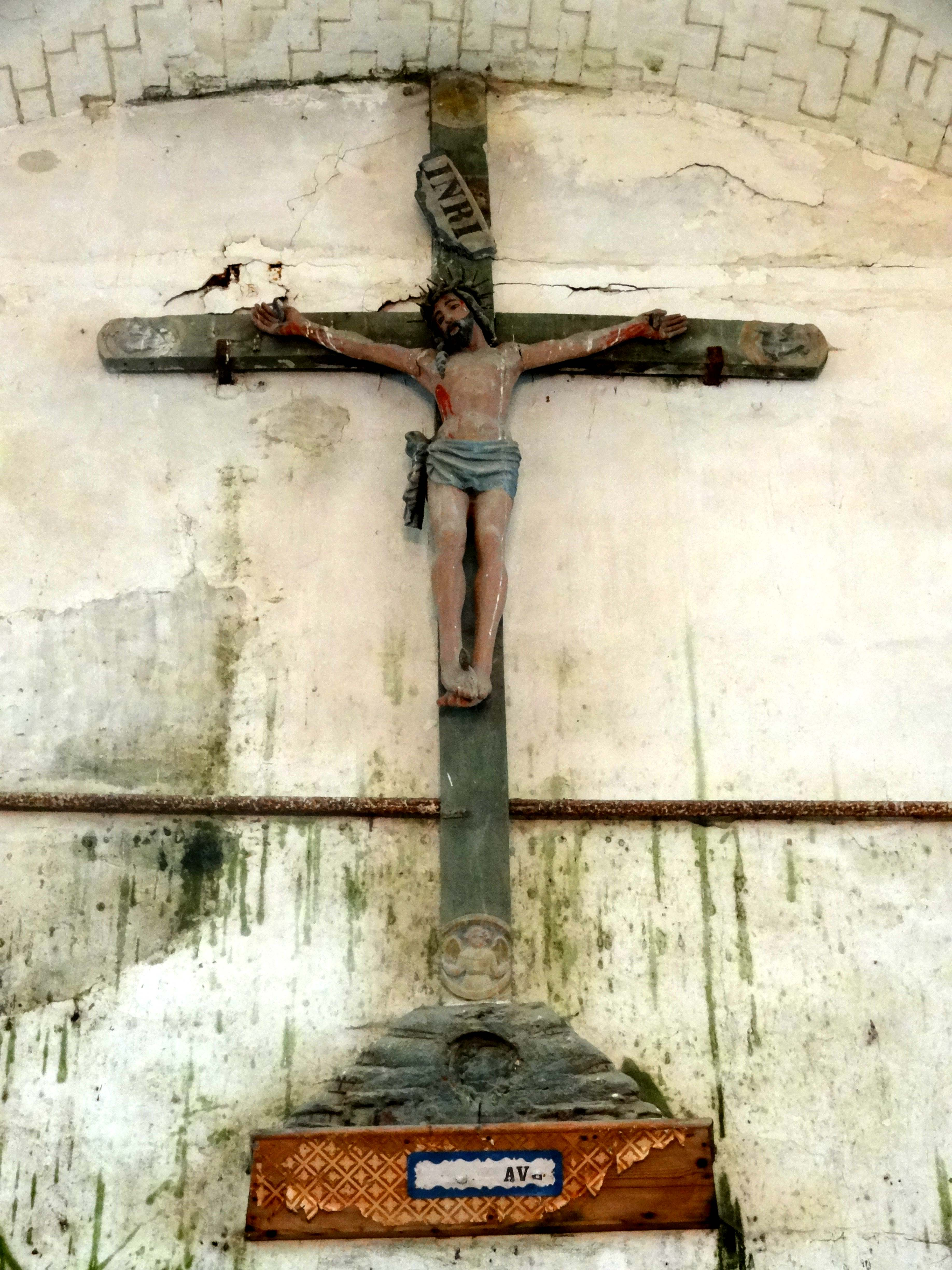 Mobilier de l'église - voir titre.